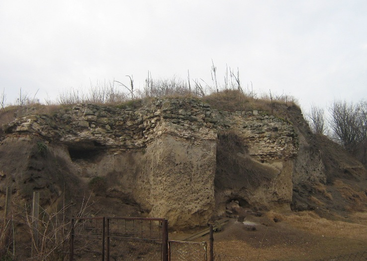 Остаци средњевековне тврђаве, Старог града, у Ковину. Author:JustUser